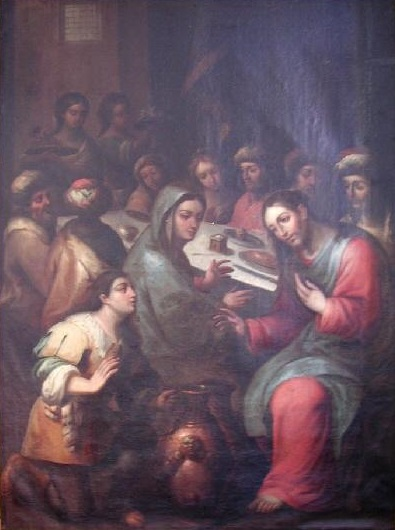 La obra representa las Bodas de Caná, donde Jesucristo realizó el milagro de convertir el agua en vino, que fue el primero de los milagros realizados en su vida pública.